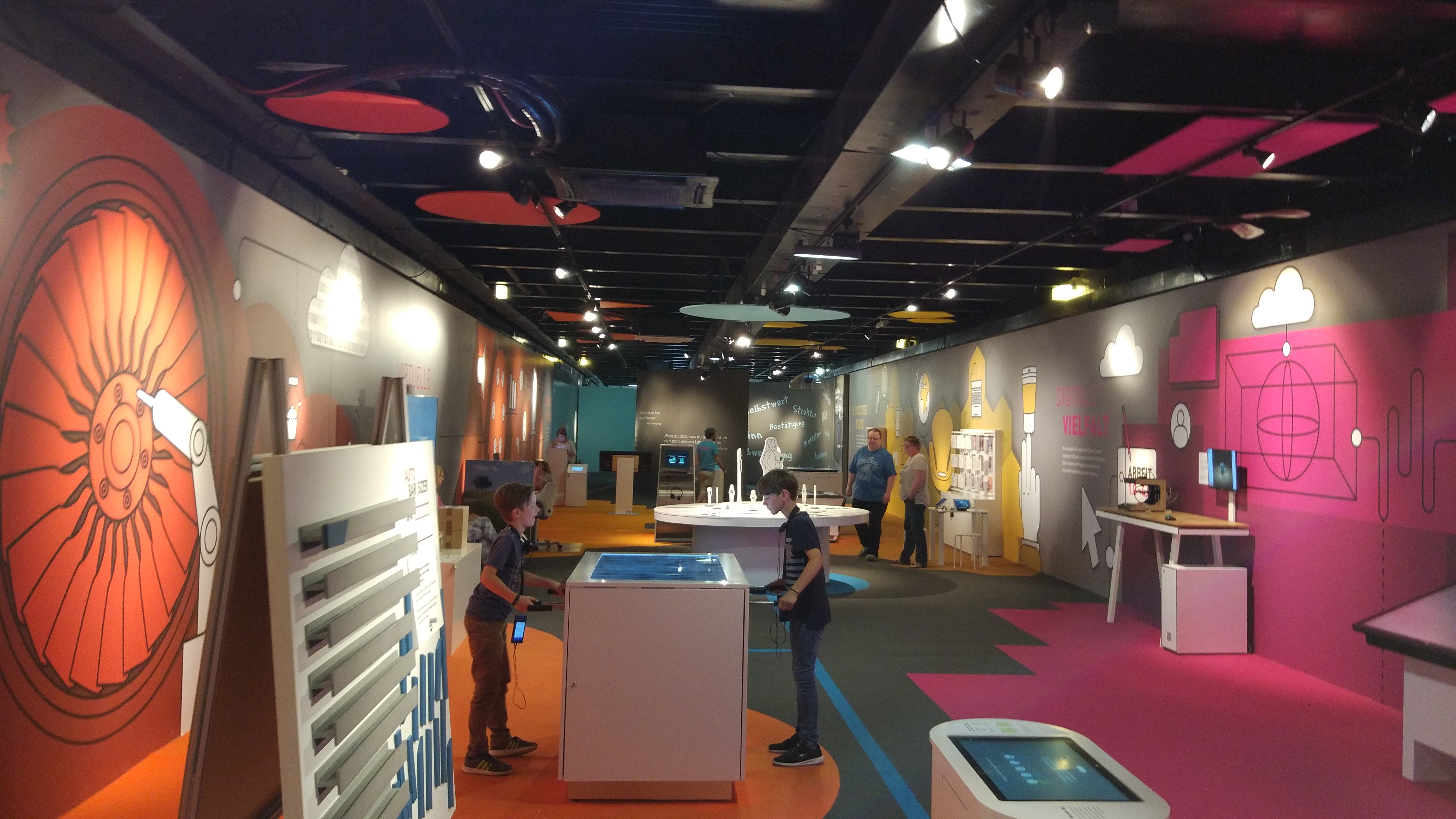 Das Ausstellungsschiff MS Wissenschaft auf seiner Tour 2018 in Nienburg/Weser, am Anleger für Ausflugsschiffe. Blick in den Ausstellungsraum im ehemaligen Frachtraum des Schiffes.